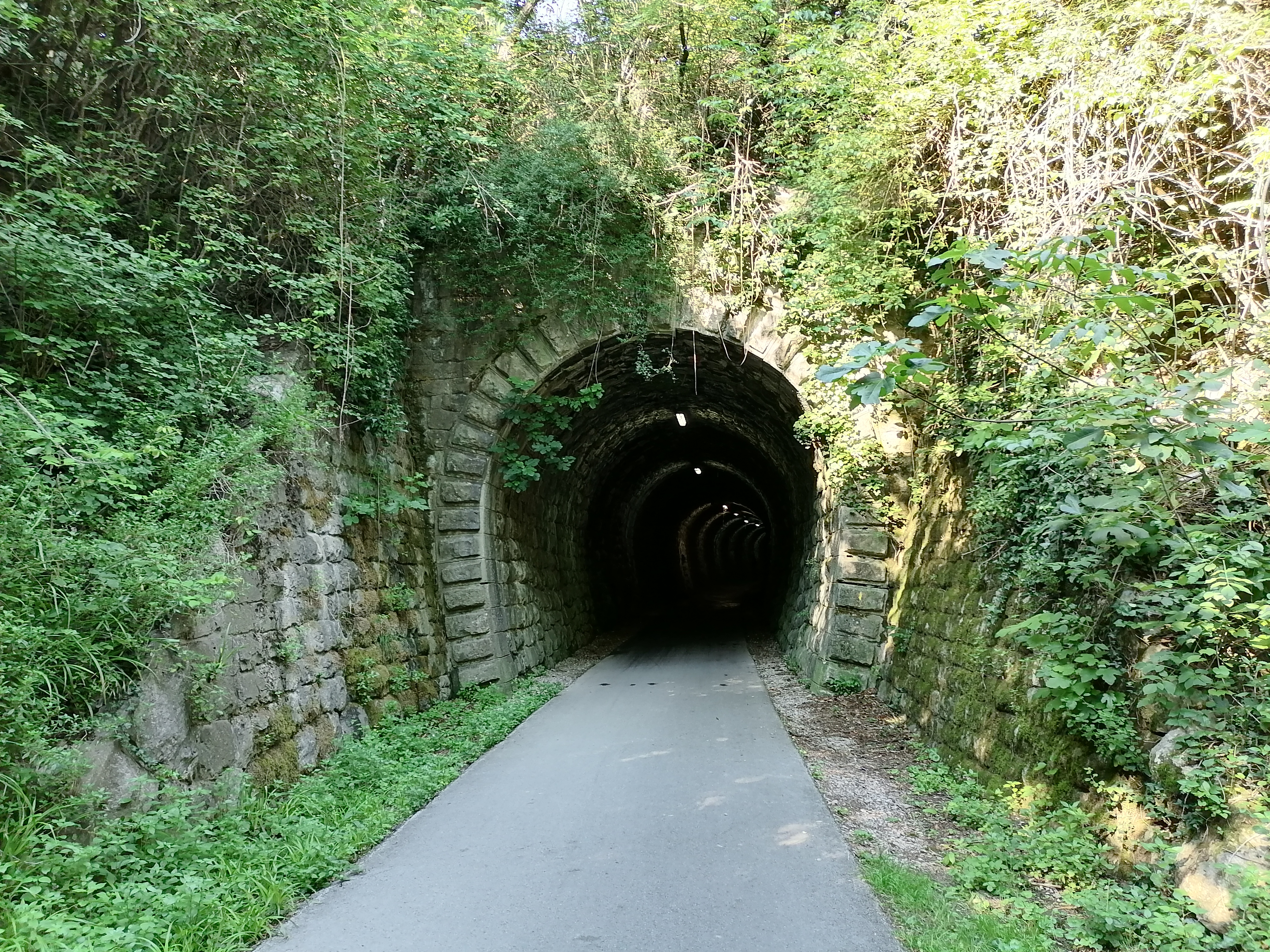 Predor Šalet